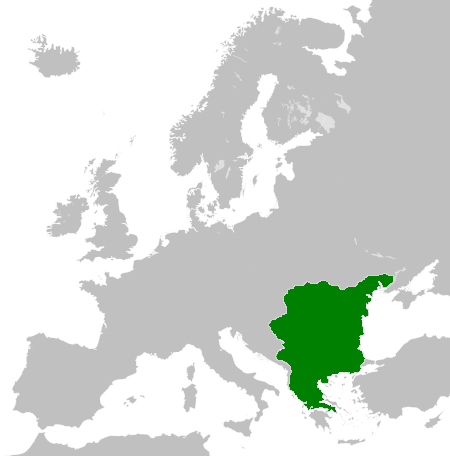 Първо Българско Царство